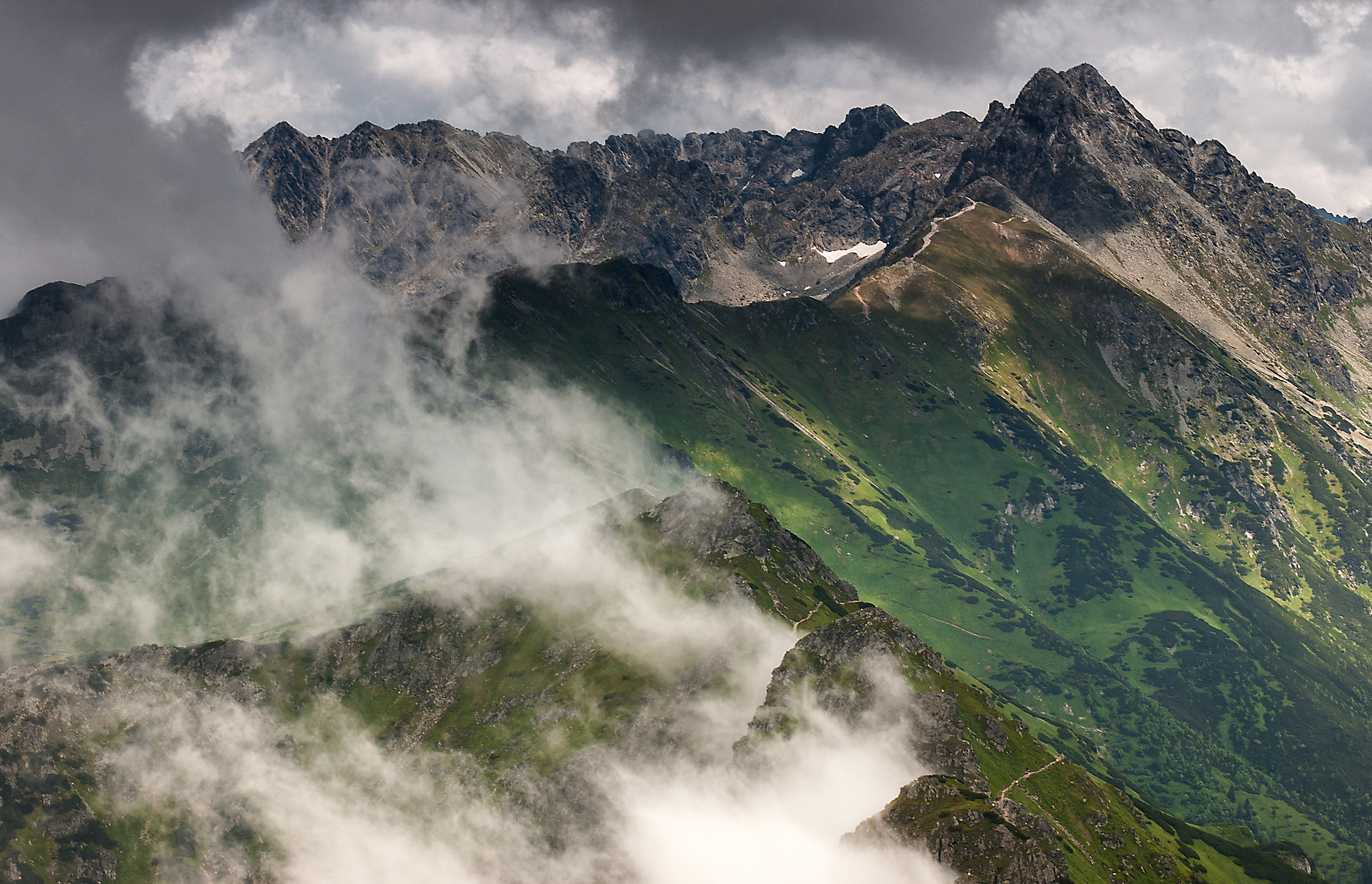 Specjalny obszar ochrony siedlisk Tatry. Świnica widziana ze szlaku w pobliżu Suchego Wierchu. This is a photography of Natura 2000 protected area with ID PLC120001